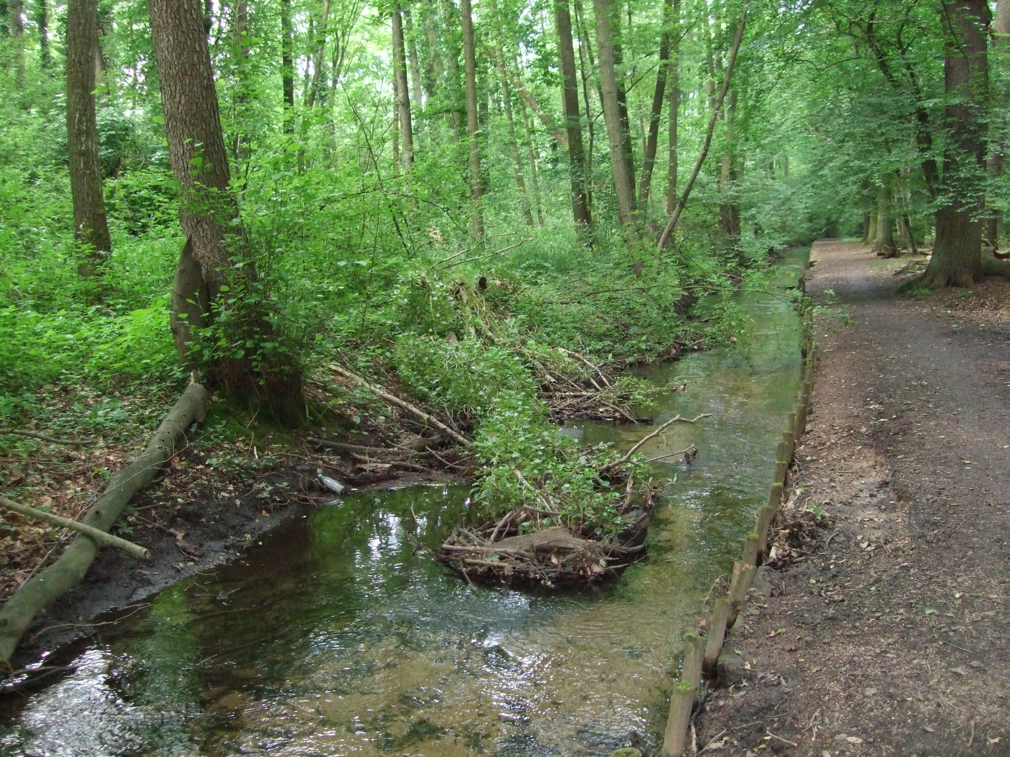 Hainbach